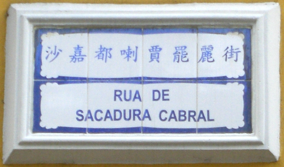 Rua de Sacadura Cabral